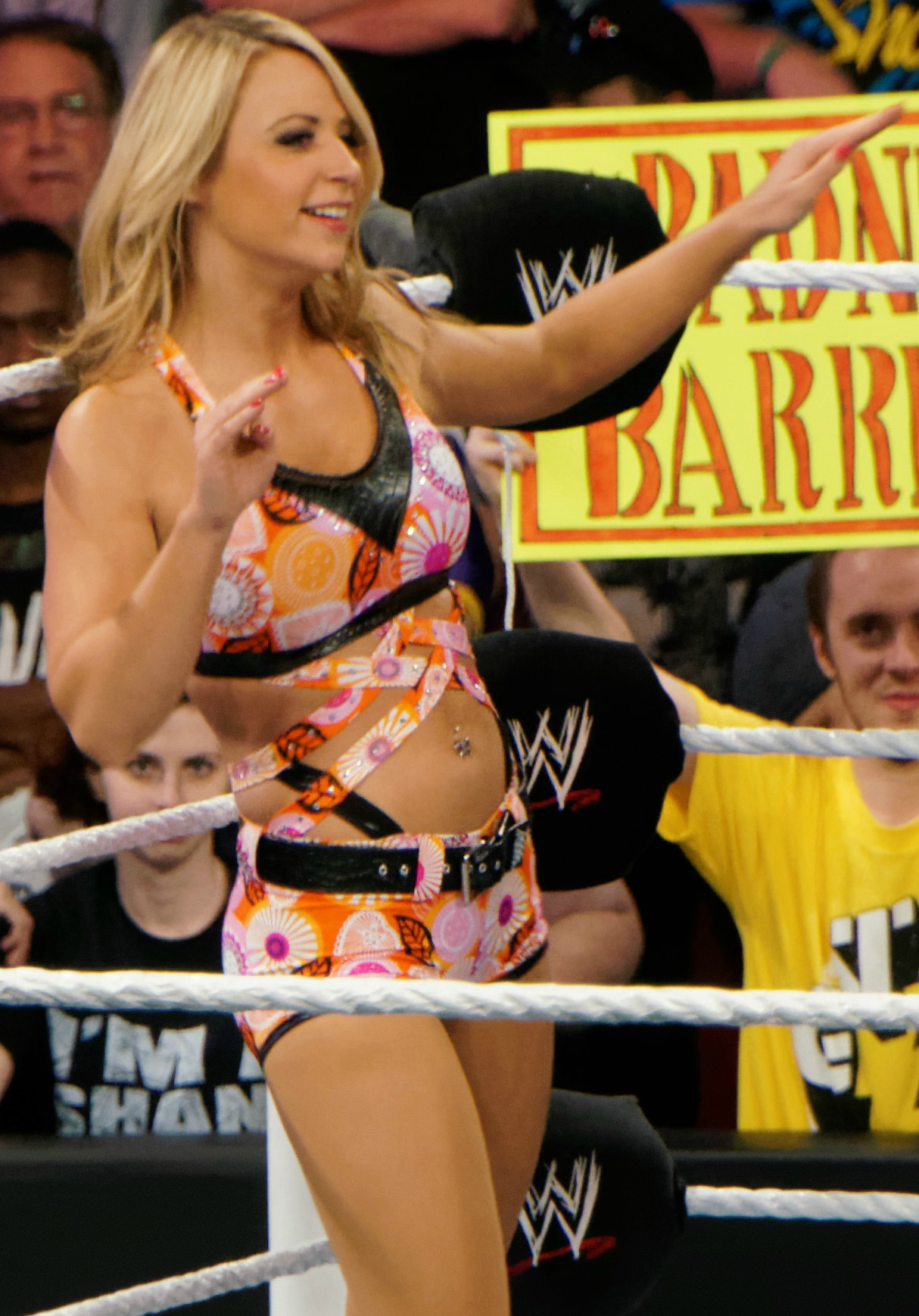 Emma performing her then-face signature dance the night after WrestleMania 30 on Raw in April 2014.